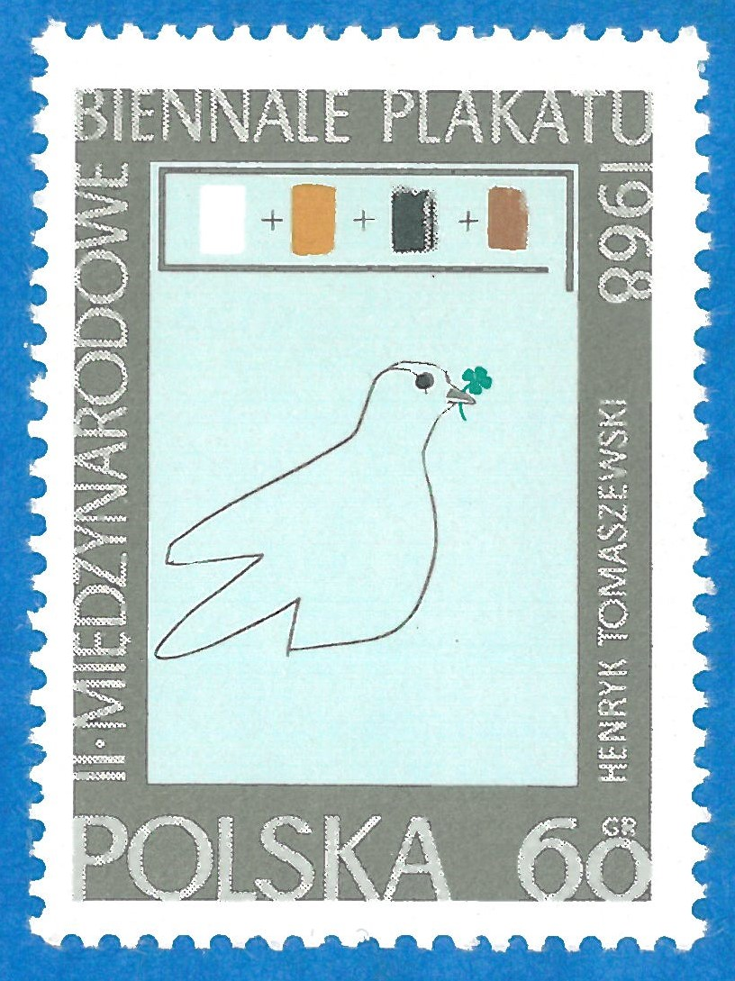 Gedenkbriefmarke der Polnischen Post anlässlich der II. Internationalen Plakatbiennale in Warschau 1968; Motiv: Plakat "Peace" von Henryk Tomaszewski